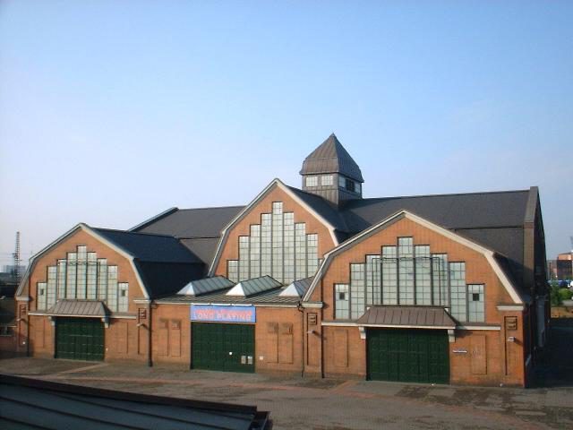 Blick auf die Südhalle This is a photograph of an architectural monument.